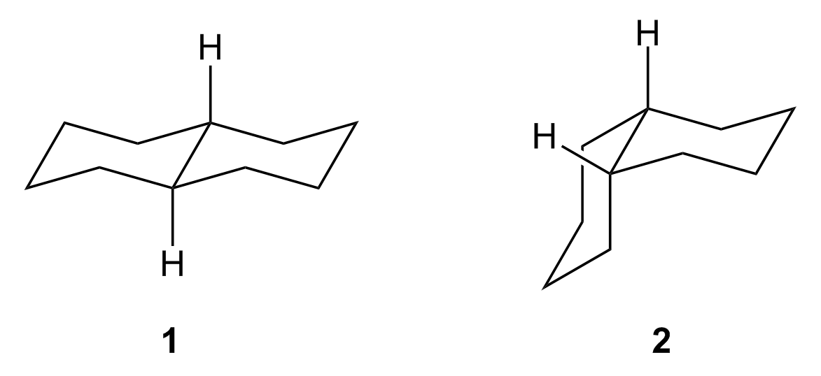 Trans- (1) en cis-decaline (2)